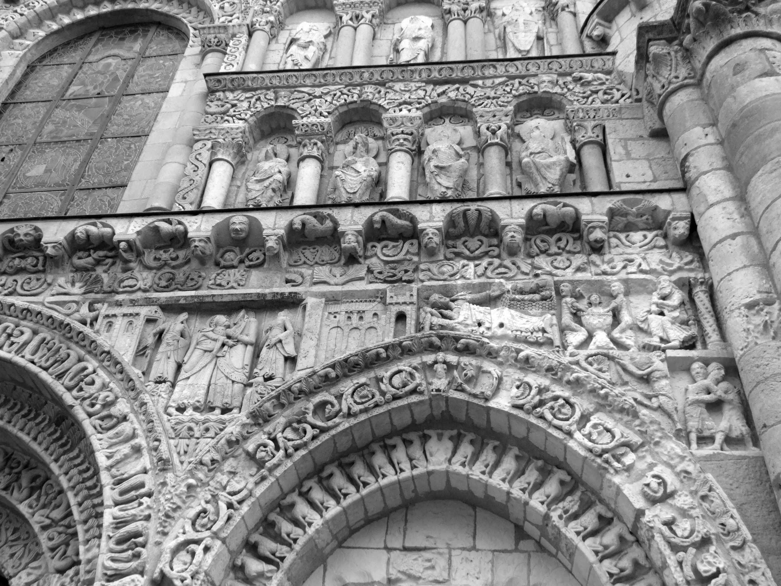 Notre-Dame la Grande de Poitiers, Poitiers, Poitou-Charentes, FRANCE